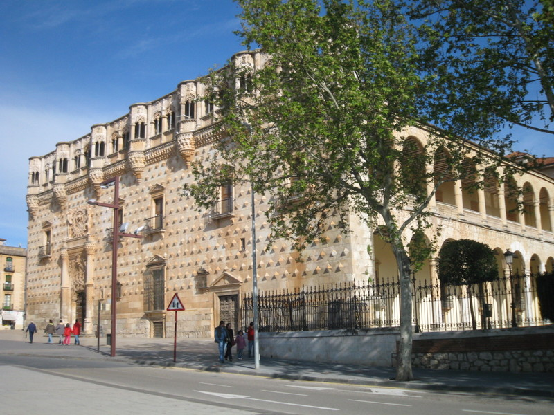 Palacio del Infantado in Guadalajara, Spain